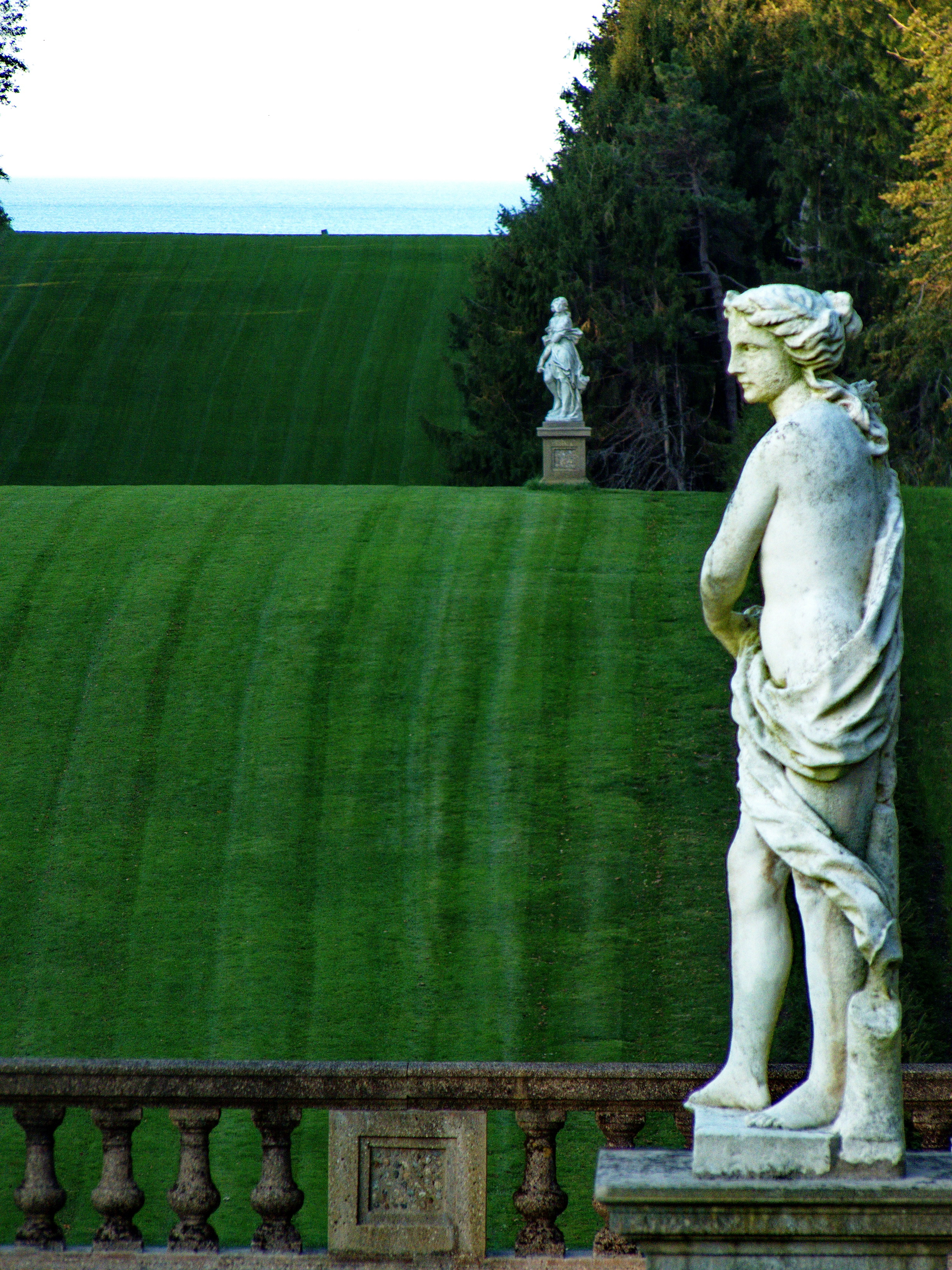 Ipswich, Massachusetts